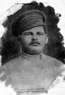 Избышев Артём Иванович (1885-1919)